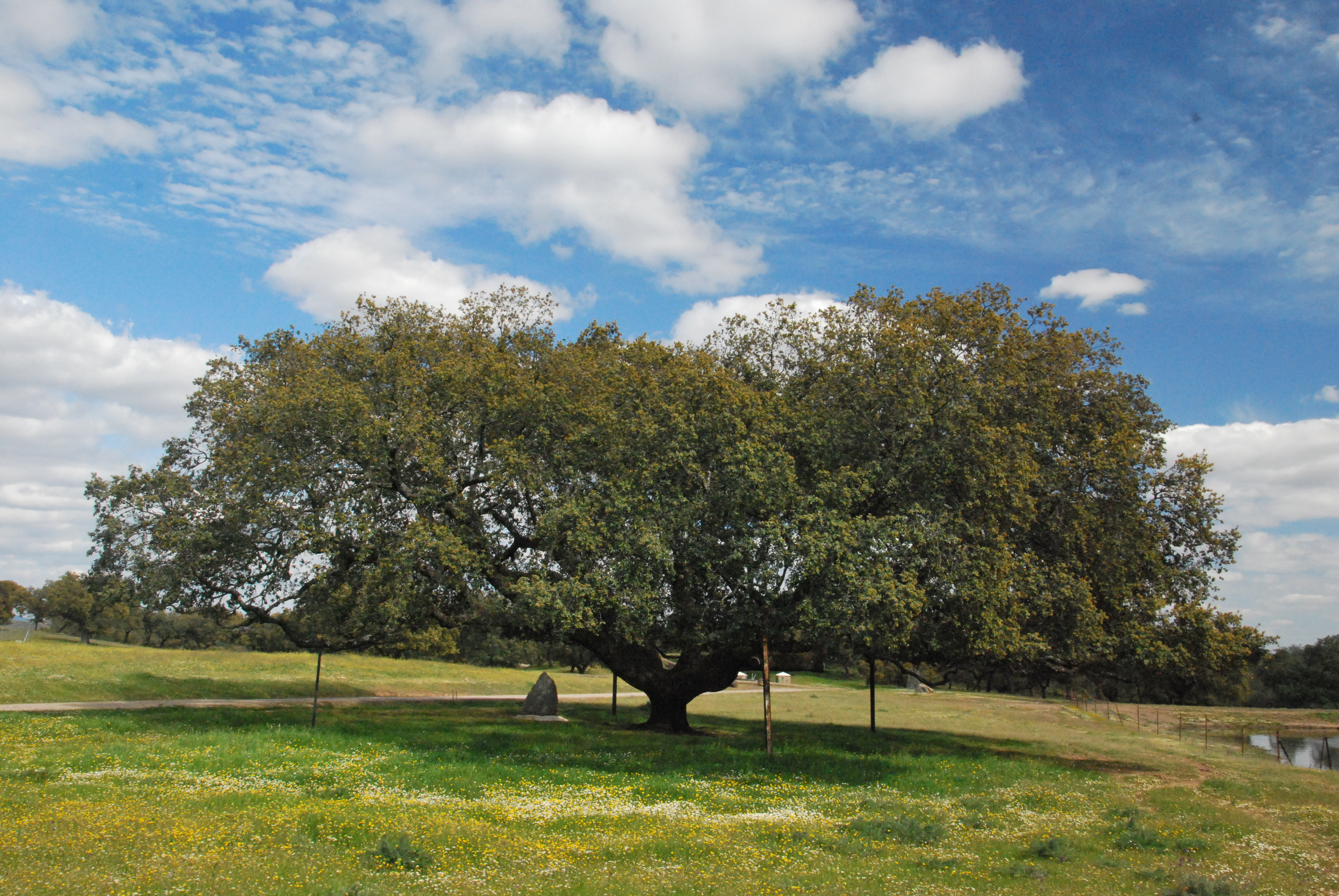 Monumento natural "Encina de la Dehesa San Francisco" en la Sierra de Aracena y Picos de Aroche (Santa Olalla del Cala) This is a photography of a Special Area of Conservation in Spain with the ID: ES0000051. Natura2000 entry, EEA entry